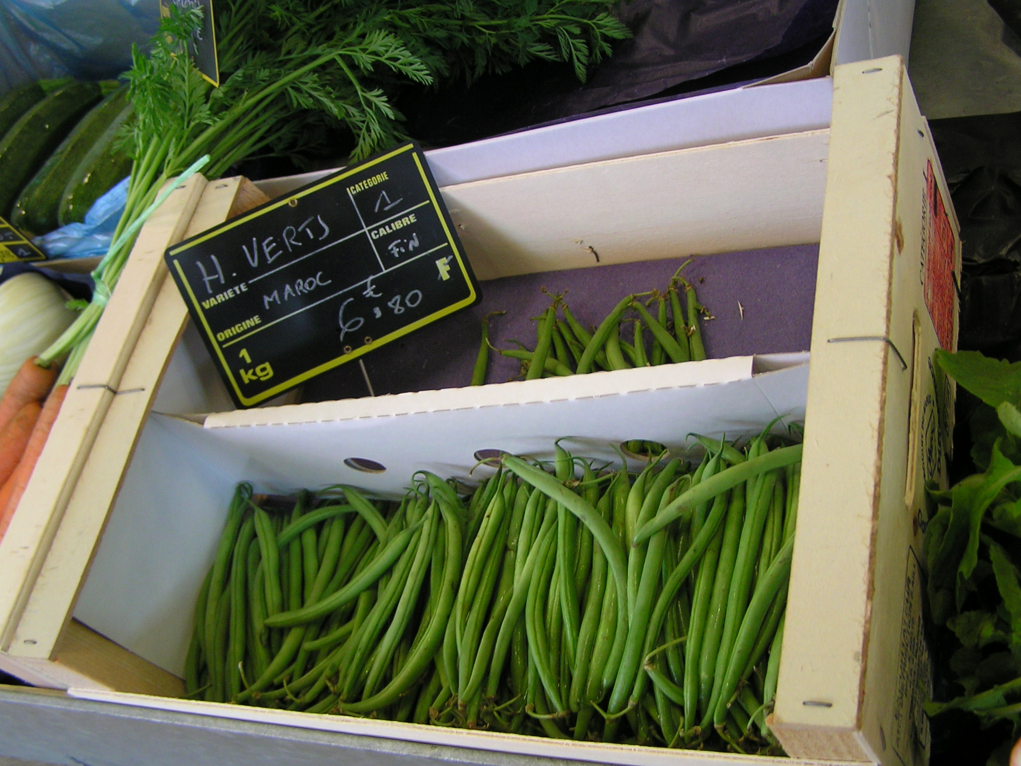 haricots verts